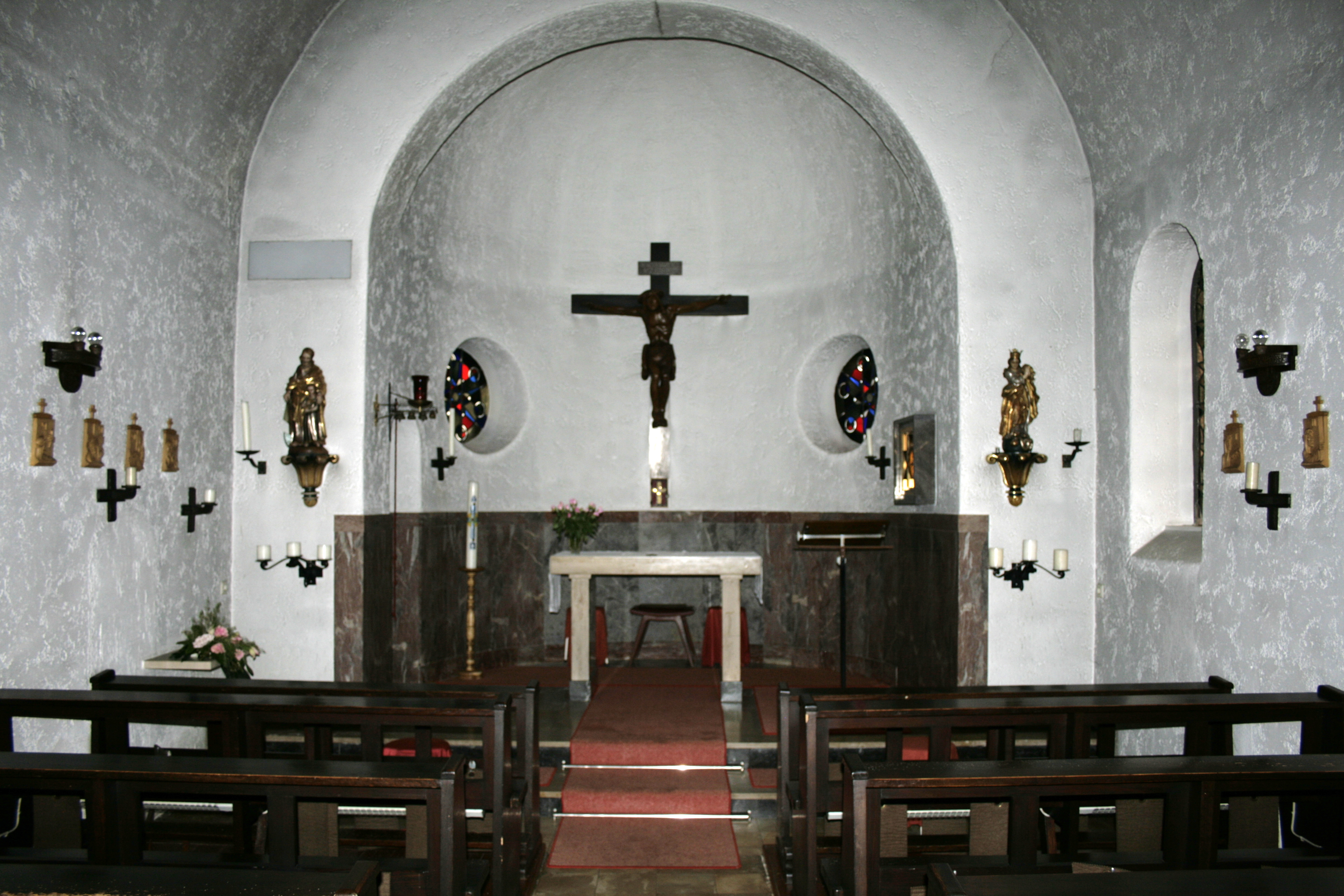 Innenraum der Kapelle in Heuchelheim, Deutschland